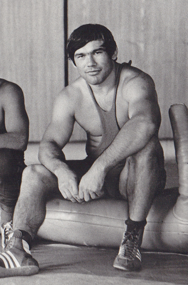 Gennady Korban